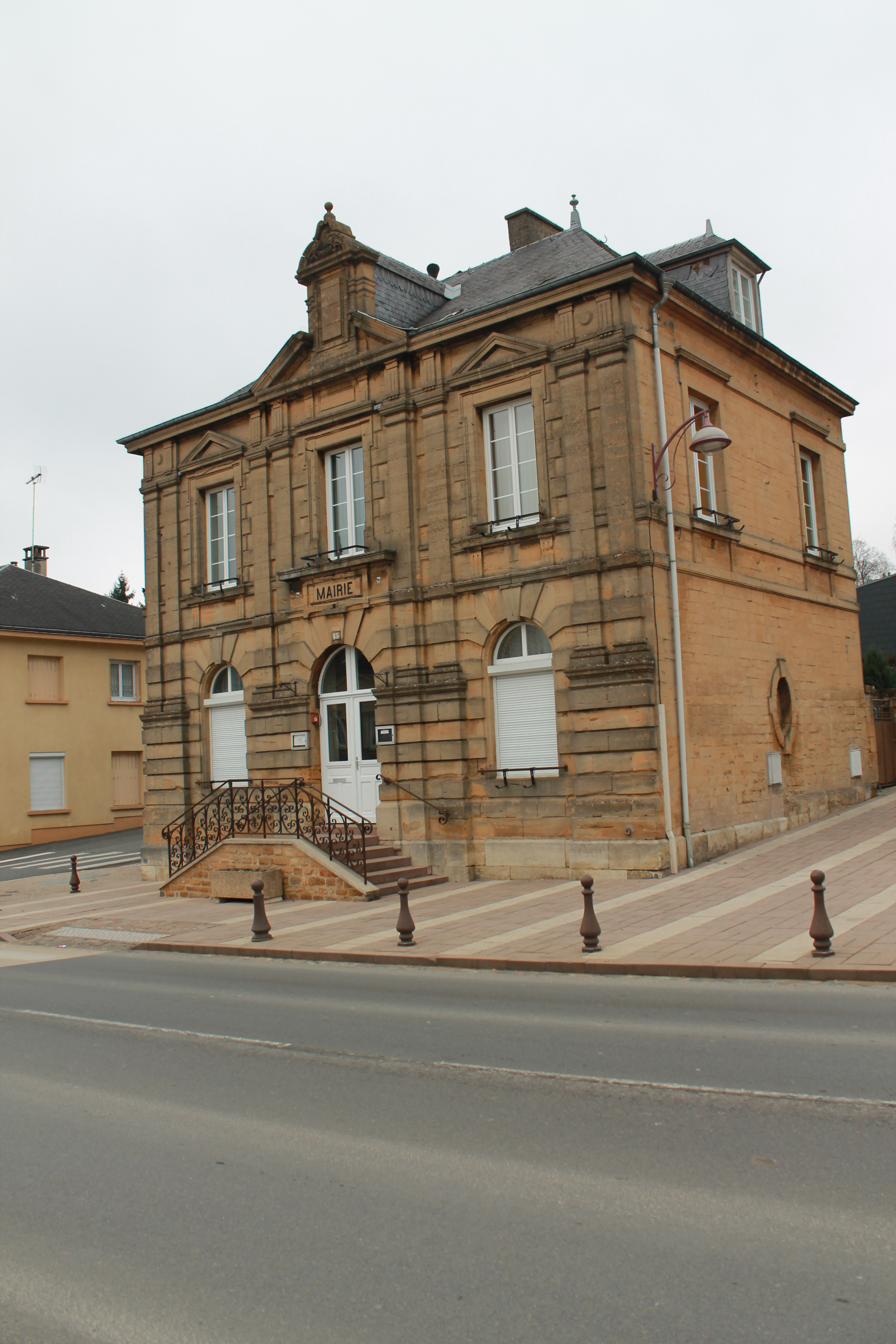 Mairie de Flize.